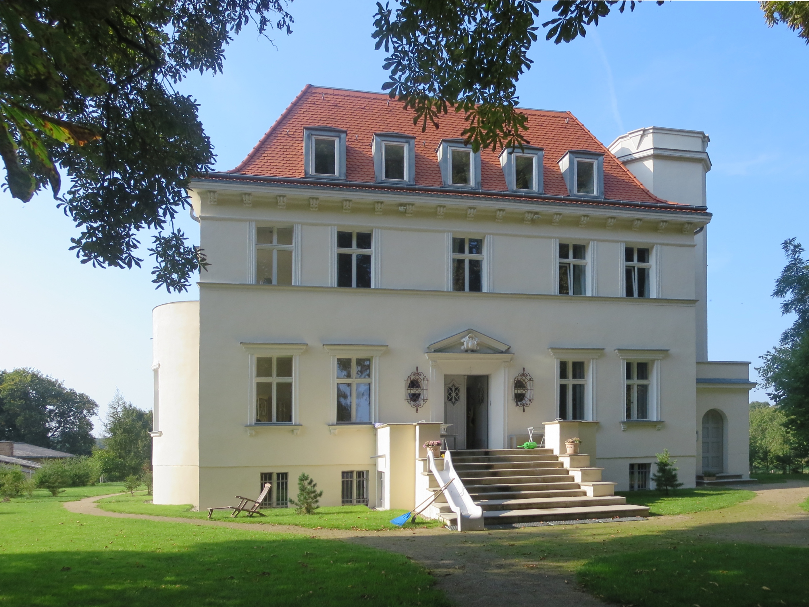 Vietmannsdorf, „Schloss“